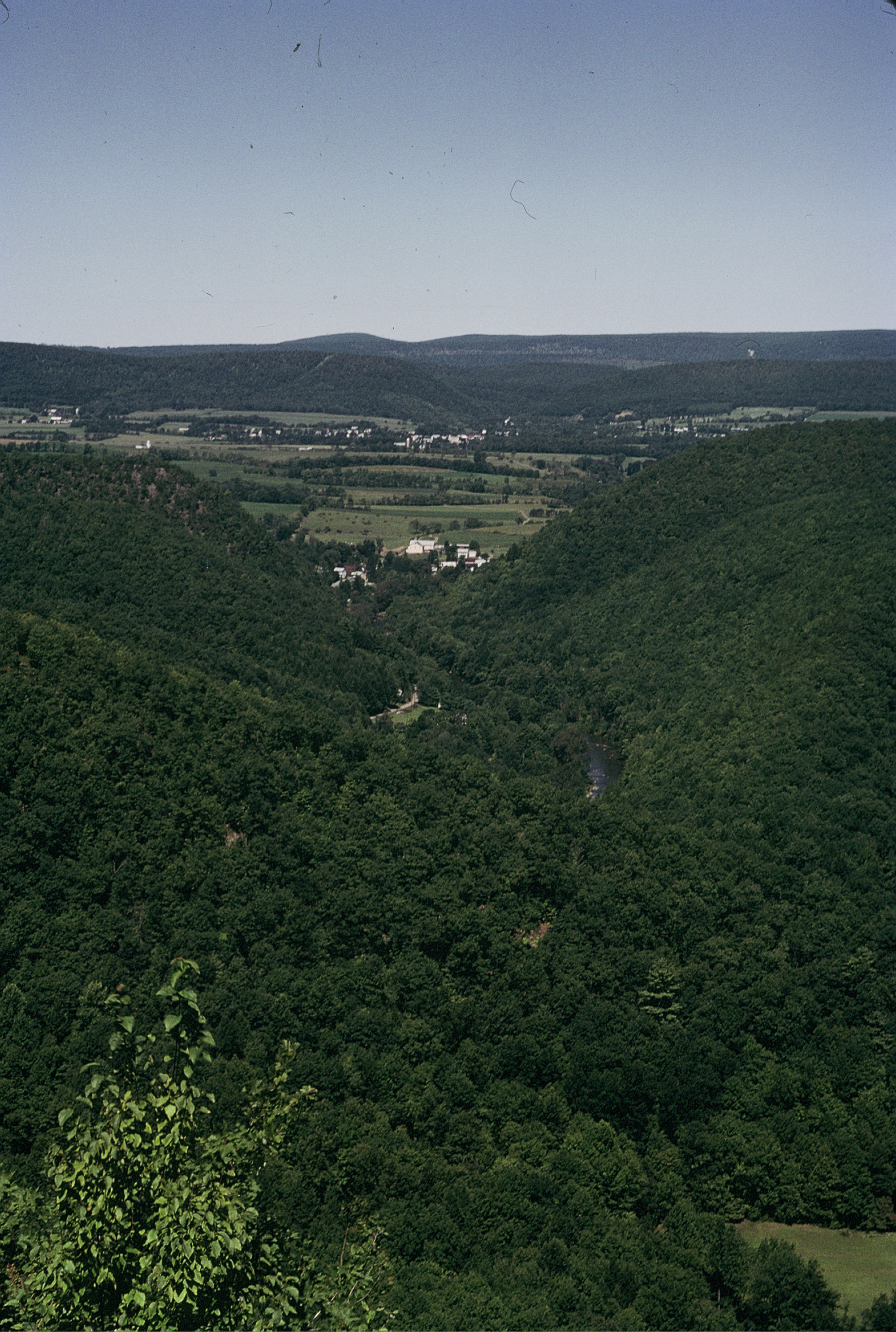 Un típico ejemplo de relieve apalachano en Pennsylvania, Estados Unidos. La erosión en estructuras plegadas da origen a un sistema de cuestas con las crestas rectilíneas formadas por los estratos más resistentes que están, a su vez, intercaladas por valles también longitudinales que a veces se interconectan entre sí como se ve en la imagen, lo que en Geología o Geomorfología se llama un "water gap" (en inglés) o una "cluse vive" (en francés), cuando el río que sirve de conexión entre los dos valles lleva agua y "wind gap" o "cluse morte", respectivamente, cuando no la lleva.